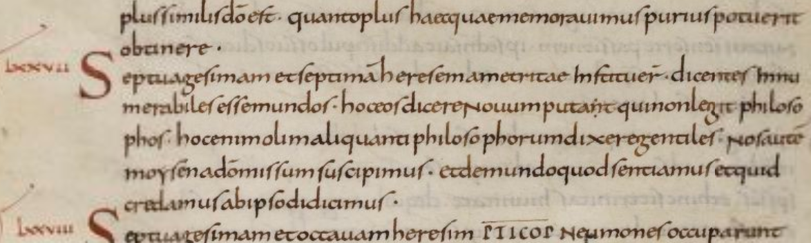 Praedestinatus. Глава LXXVII. Аметриты. Рукопись IX века. Национальная библиотека Франции